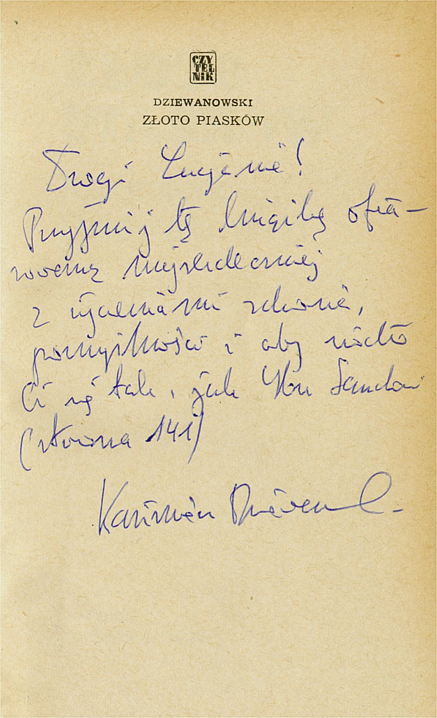 Kazimierz Dziewanowski (1930-1998)'s autograph - for Lucjan Wolanowski (1920-2006), Polish journalist, and traveller